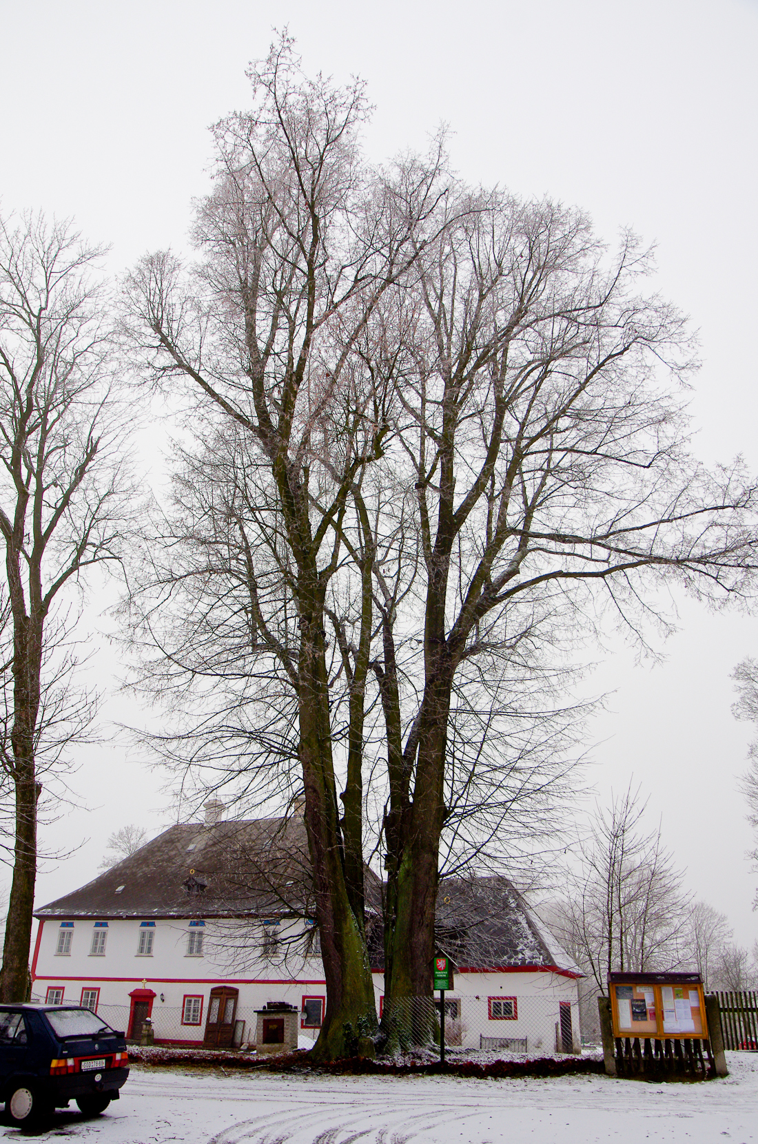 Jindřichovice, okres Sokolov, Krušné hory, Martinské lípy - památné stromy na volném prostranství za kostelem sv. Martina v Jindřichovicích, před farou, dvojice vysokých lip, esteticky zajímavé stromy